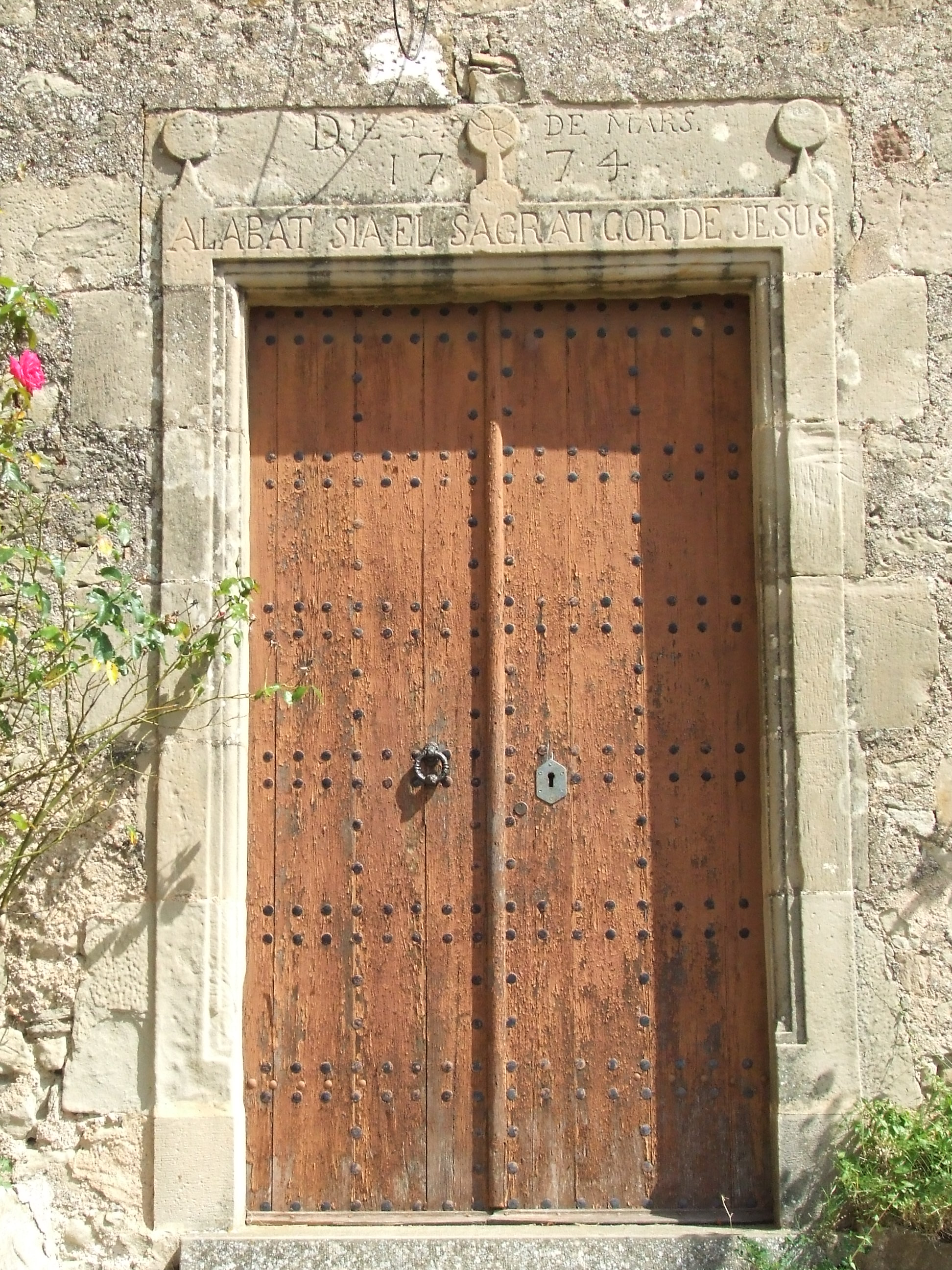 Sant Martí de Granera (Moianès)